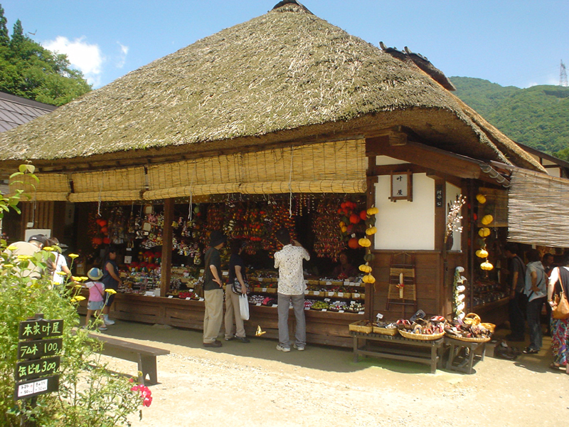 福島県ja:南会津郡ja:下郷町のja:大内宿の写真。 写真撮影：Fluffy_nns 撮影年月日：ja:2006年ja:7月26日 著作権：放棄します